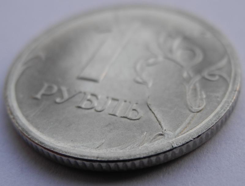 1 рубль банка России. Неполный раскол